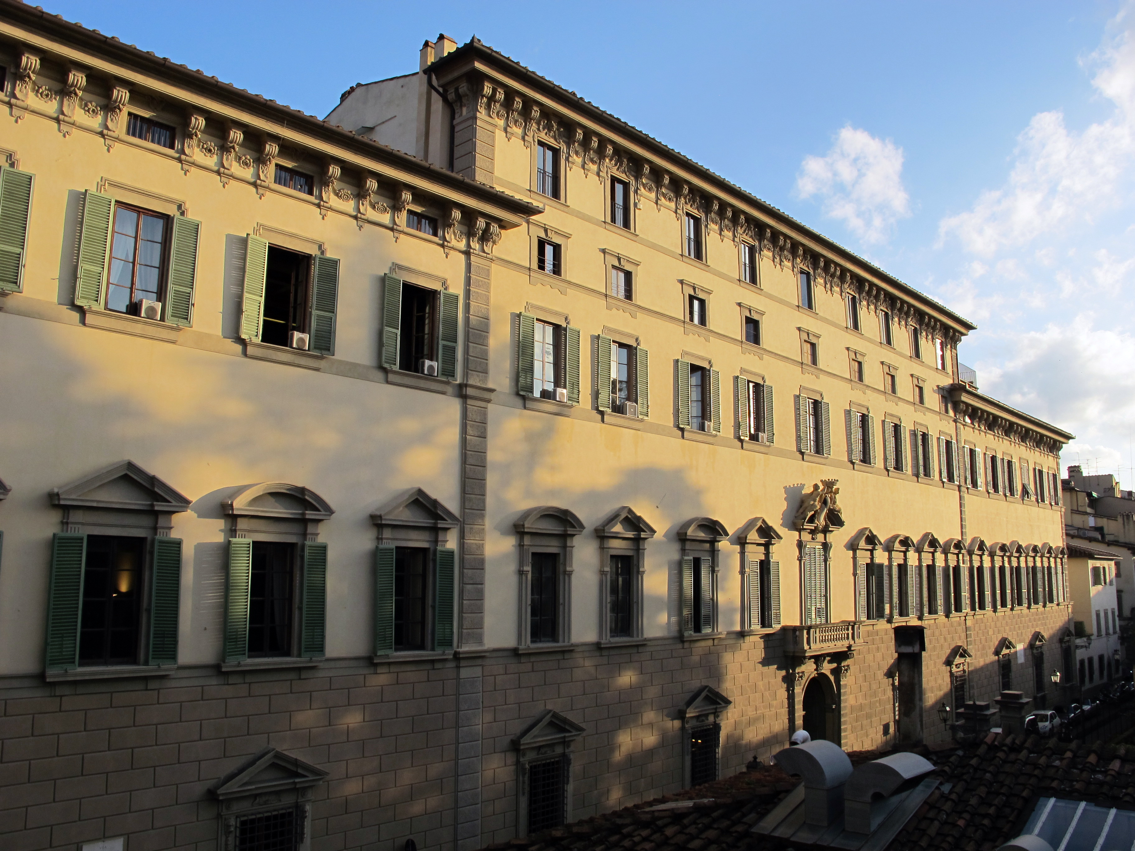 Firenze